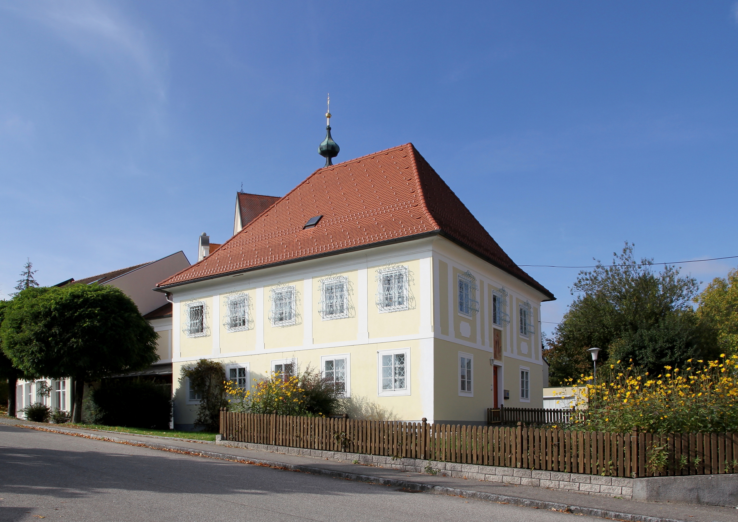 Pfarrhof der oberösterreichischen Gemeinde Niederthalheim.